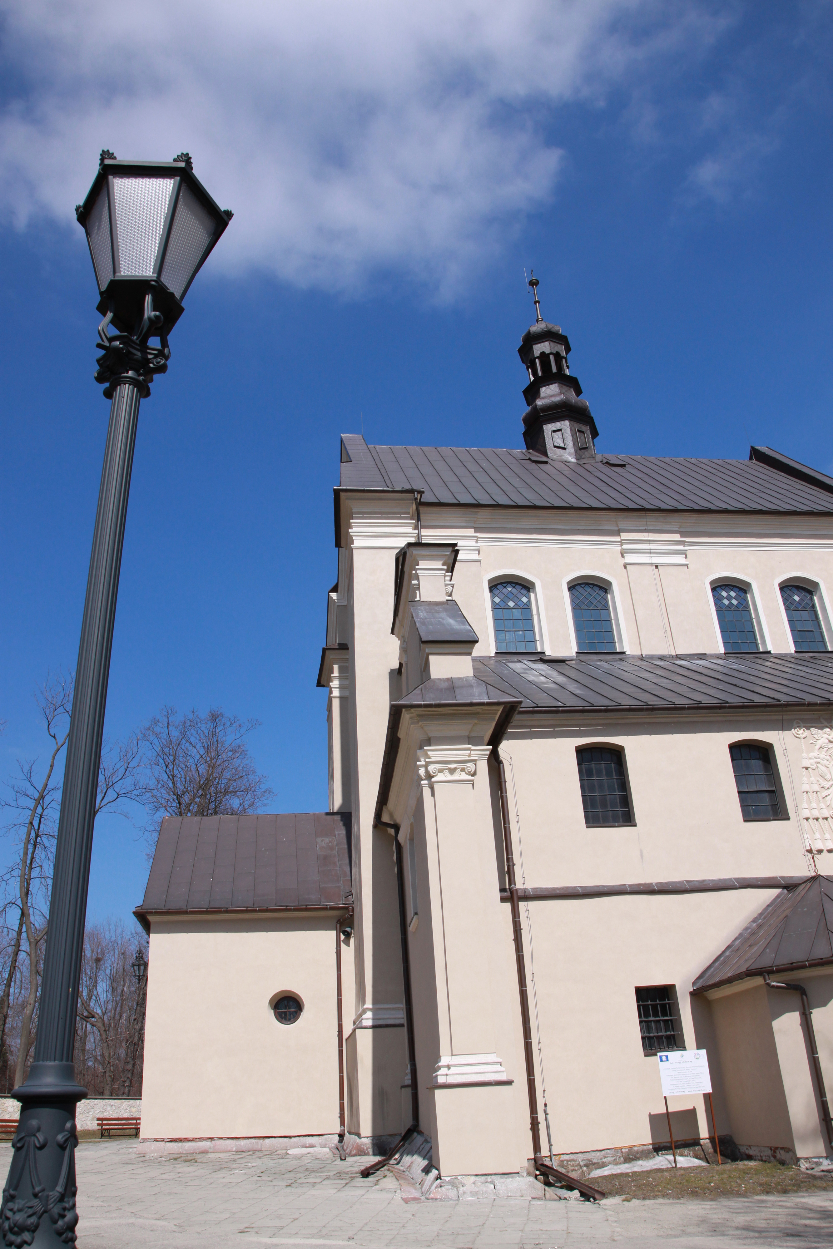 Pilica, zespół kościoła parafialnego pw. św. Jana Chrzciciela, XVIII